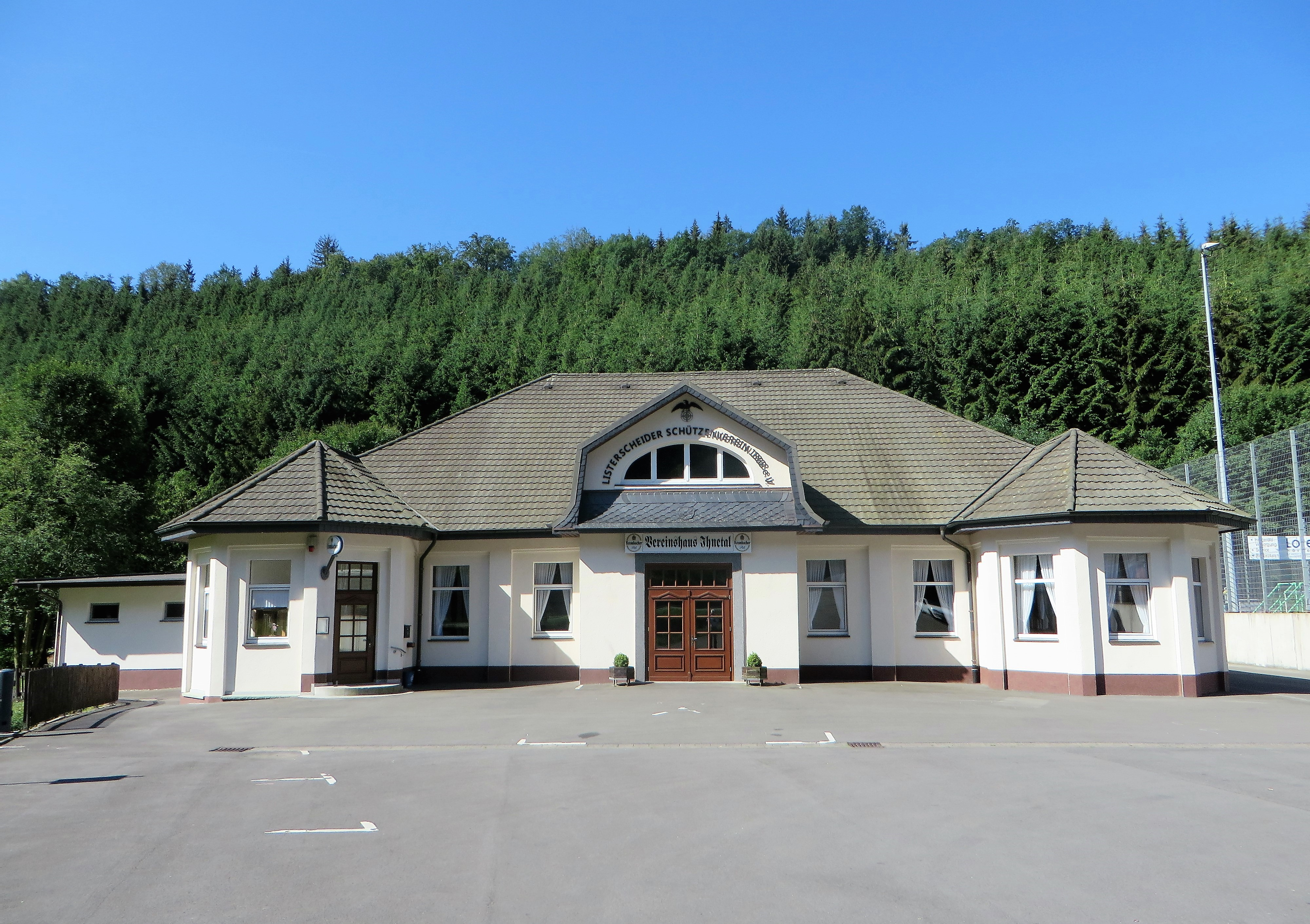 Denkmalgeschütztes Vereinshaus Ihnetal in Attendorn-Weschede, Wesetalstraße 29. Erbaut 1926/27 in Kompositionsformen des Spätbarock. Feier- und Begegnungsstätte für Listerscheid und Umgebung. This is a photograph of an architectural monument.It is on the list of cultural monuments of Attendorn